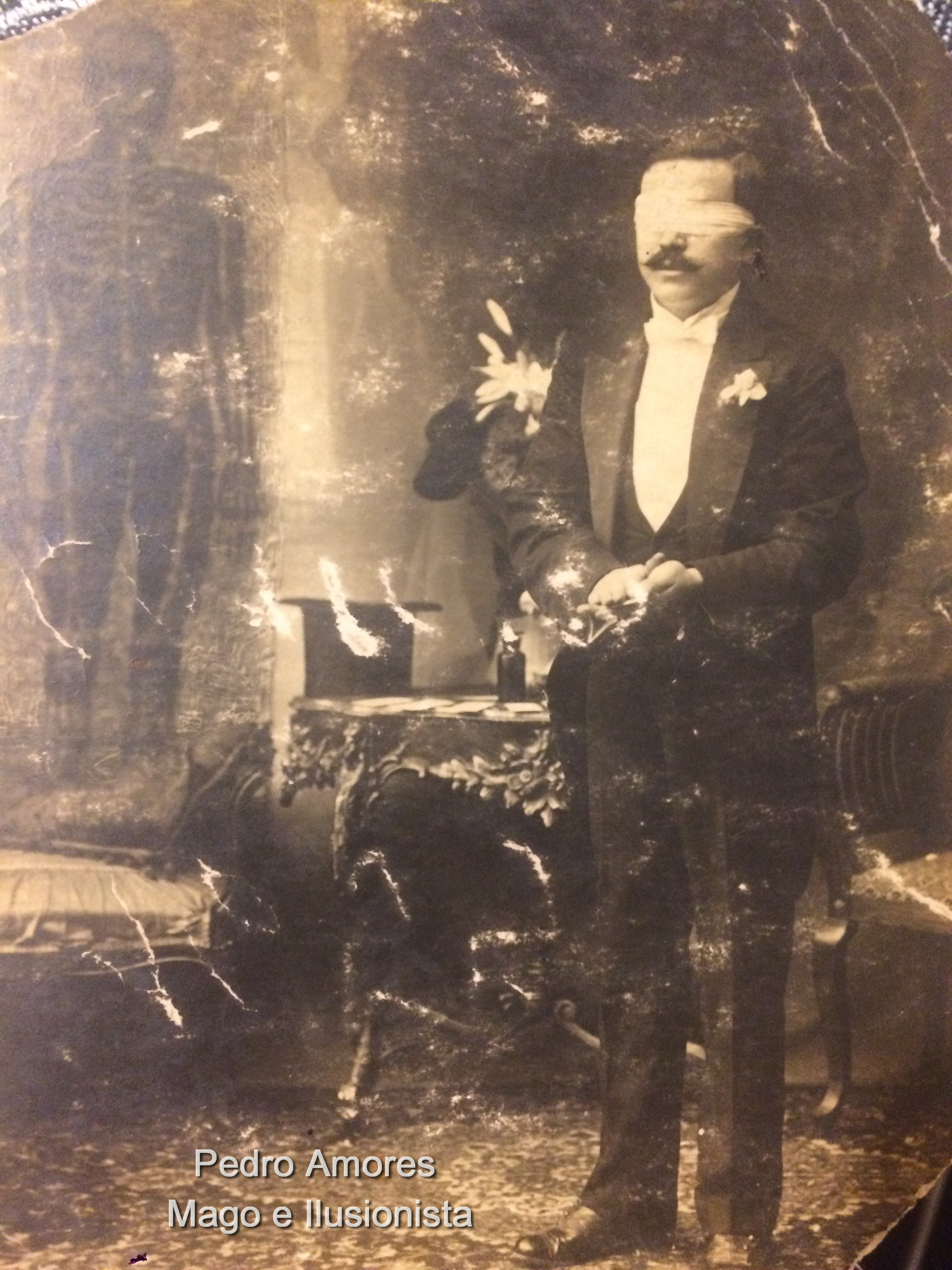 Mago e Ilusionista